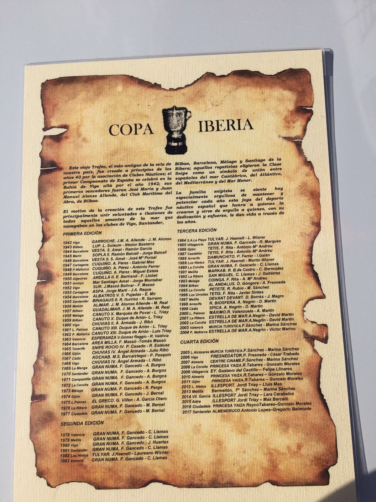 cartel sobre la Copa Iberia en el salón náutico de Barcelona 2017